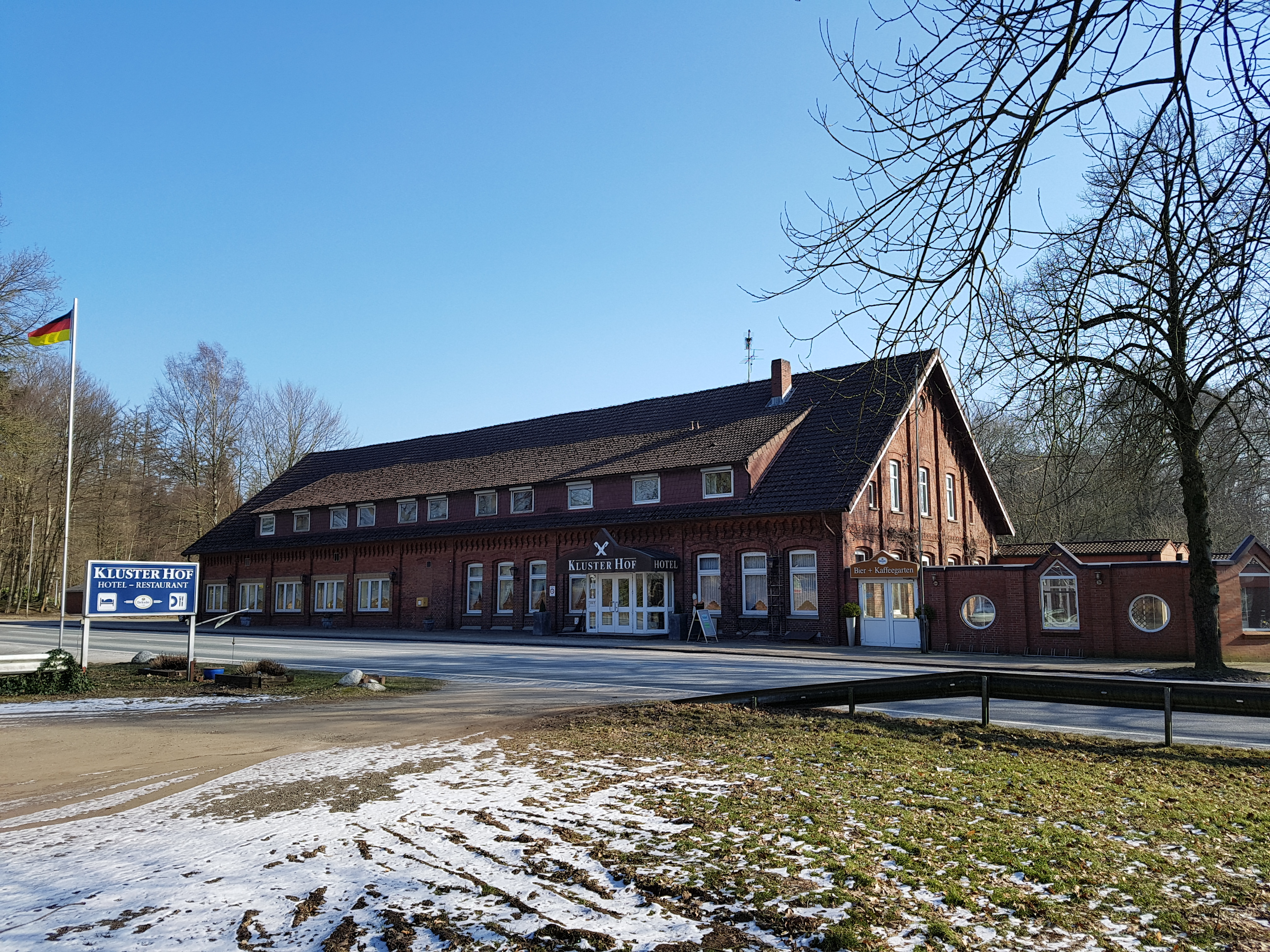 Kluuster Hoff in Kluust